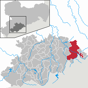 Olbernhau im Erzgebirgskreis, Sachsen